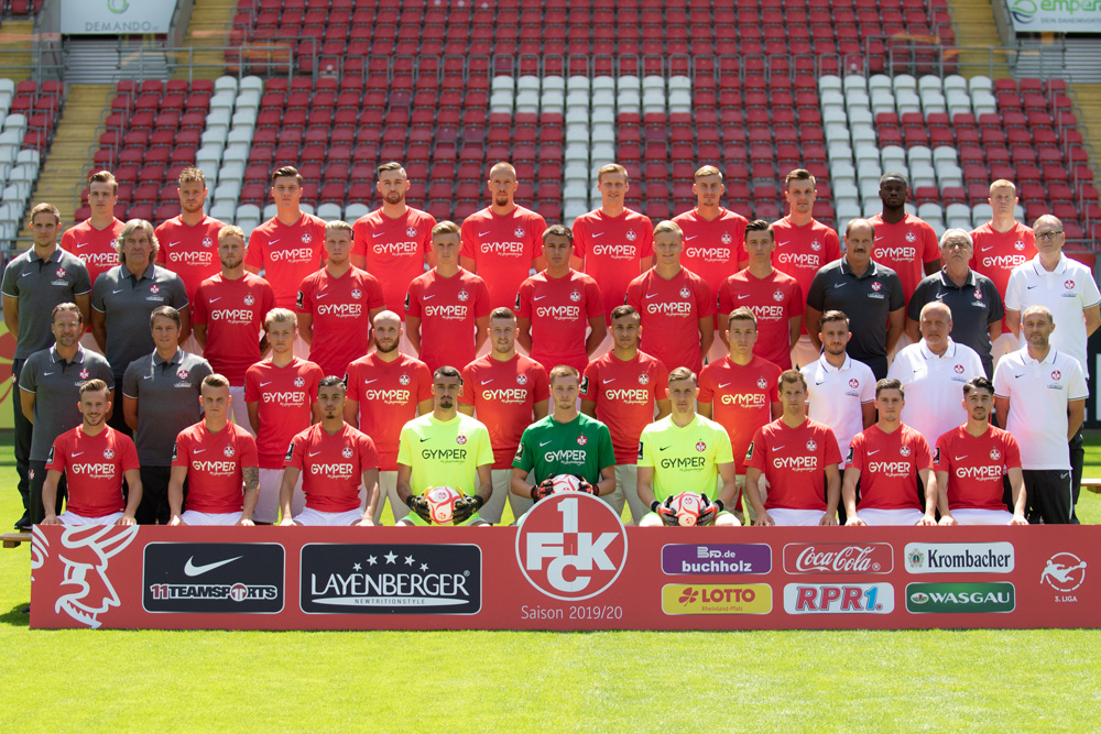 Mannschaftskader des 1. FC Kaiserslautern zur Saison 2019/20